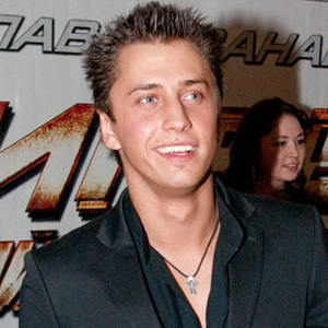 Павел Прилучный на премьере фильма «На игре: Новый уровень» 15 апреля 2010 года